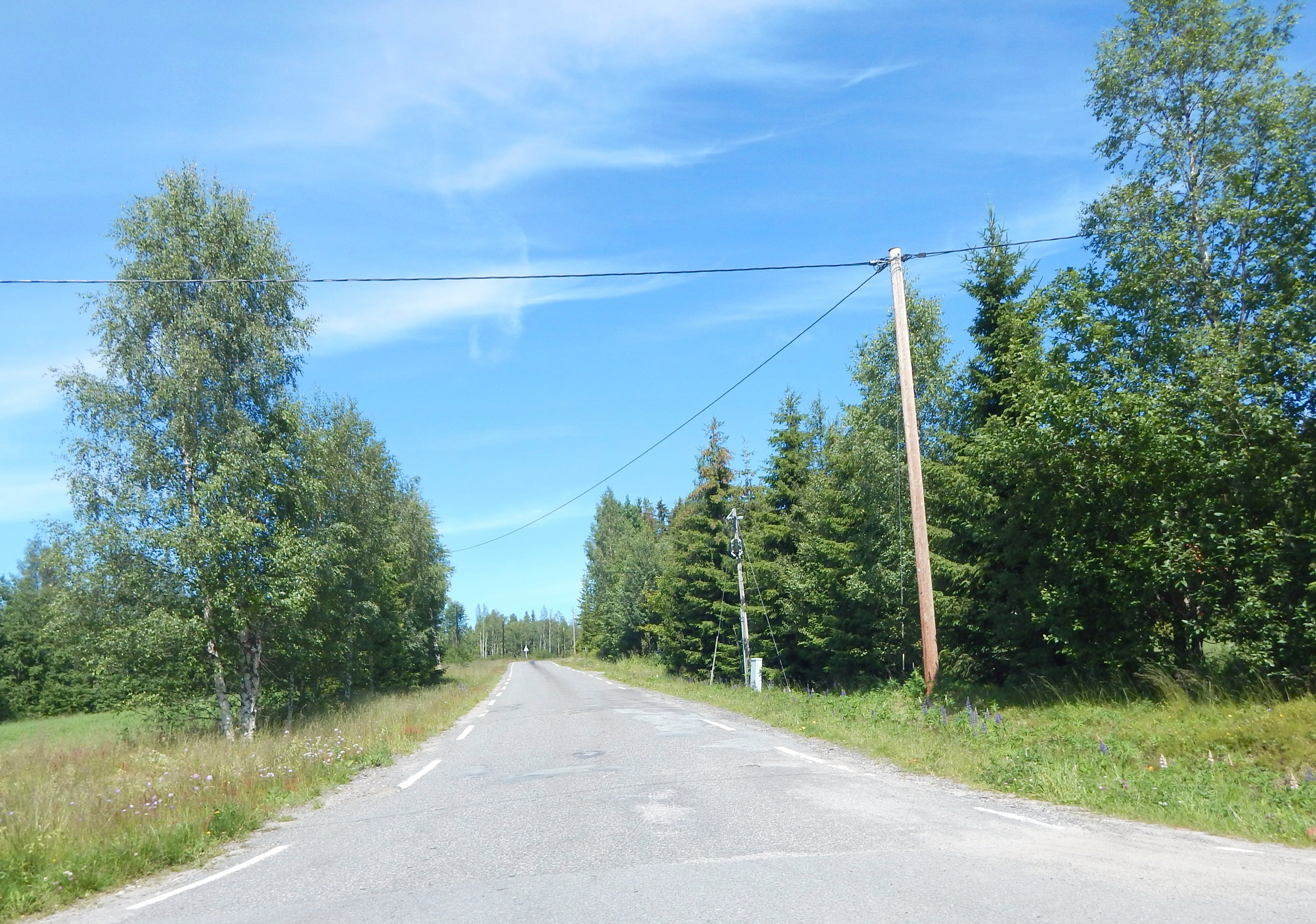 Øvre Skurubergsveg (FV540)